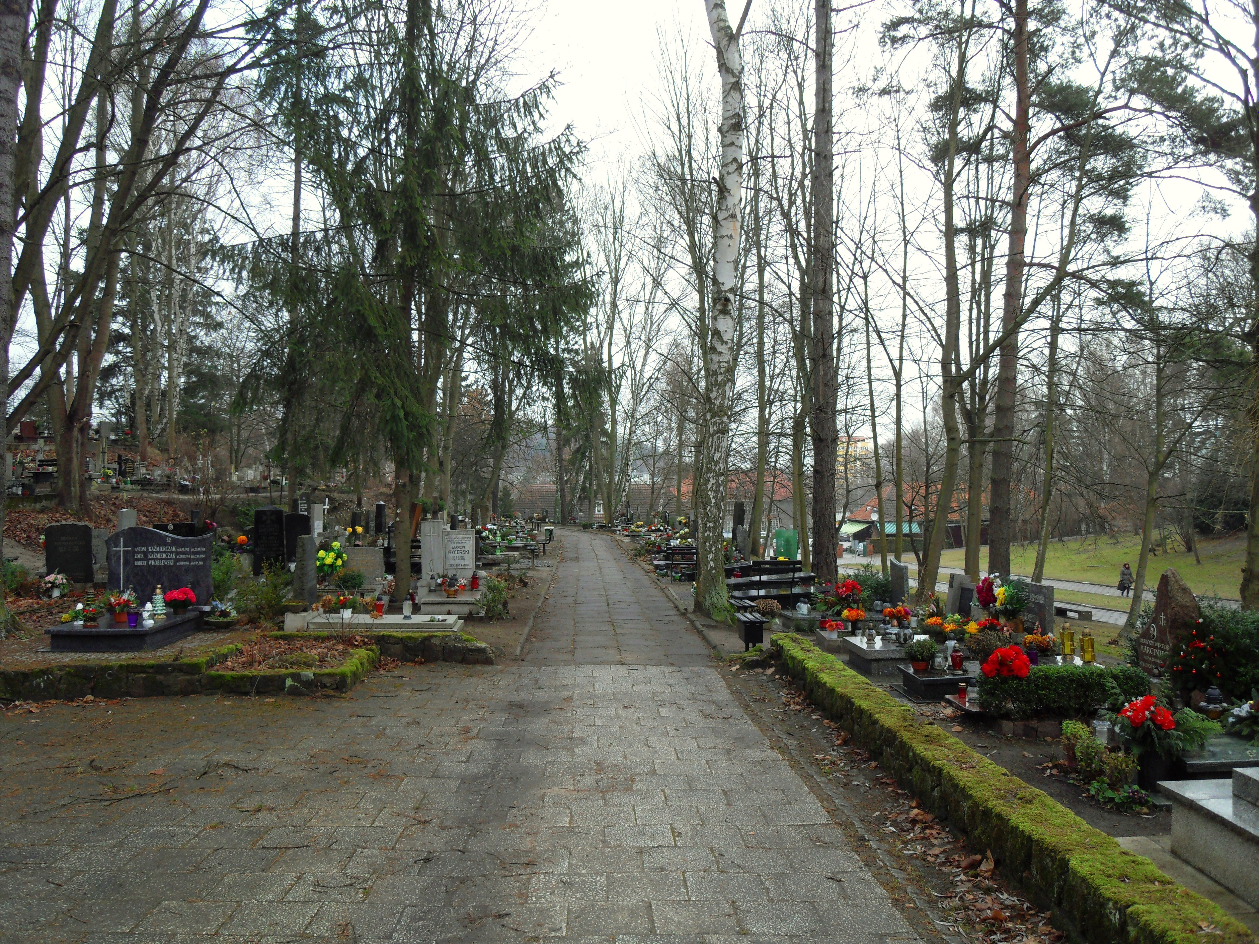 Cmentarz Srebrzysko w Gdańsku, Aleja Zasłużonych.